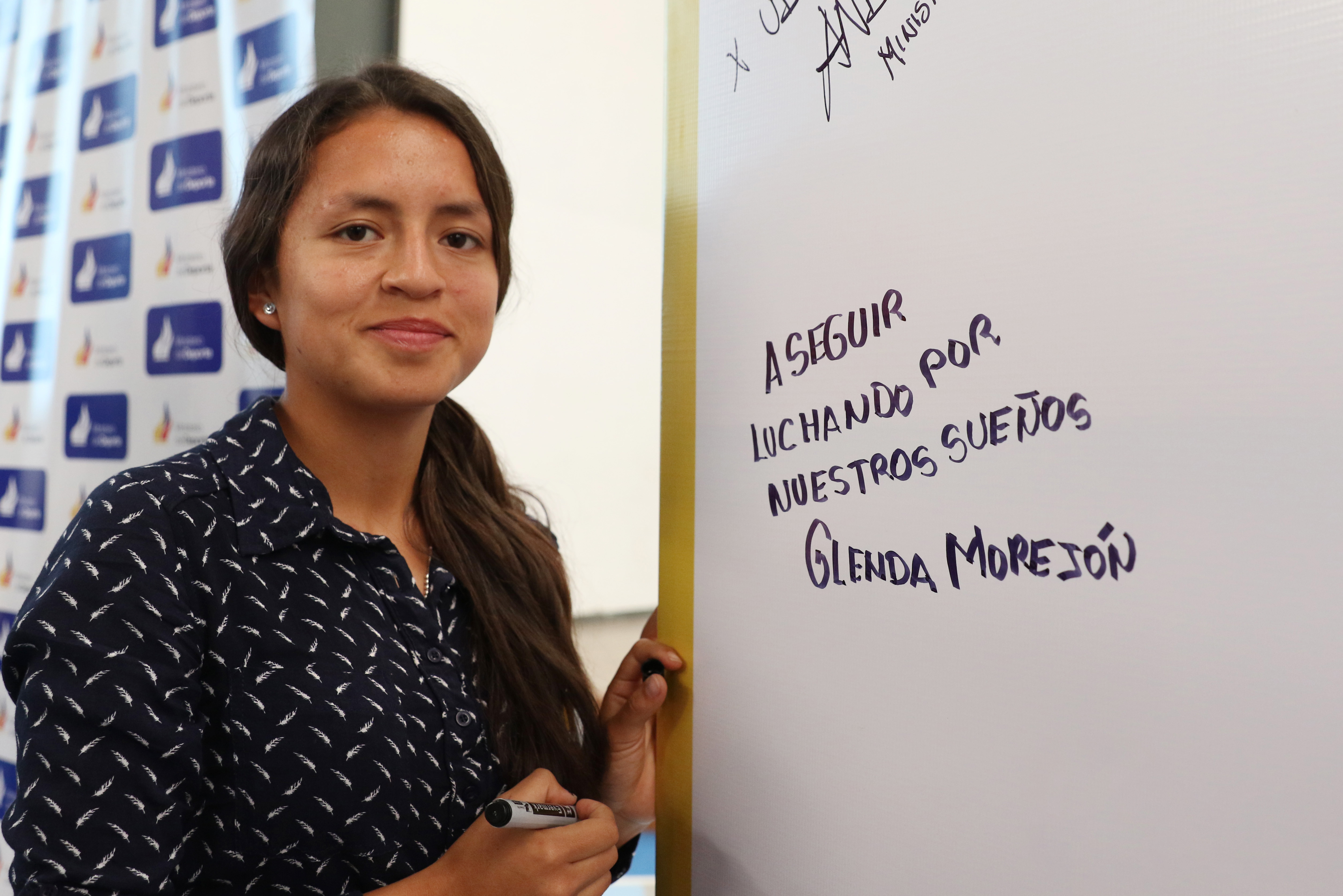 Quito, 26 de julio de 2017 (Andes).- El Ministerio del Deporte conmemoró el día del Deporte Ecuatoriano, que se celebra en homenaje a la única medalla de oro olímpica lograda por Jefferson Pérez en los juegos de Atlanta 1996. En el evento participaron varias autoridades del Deporte nacional. En la gráfica la deportista Glenda Morejón. ANDES/Micaela Ayala V.